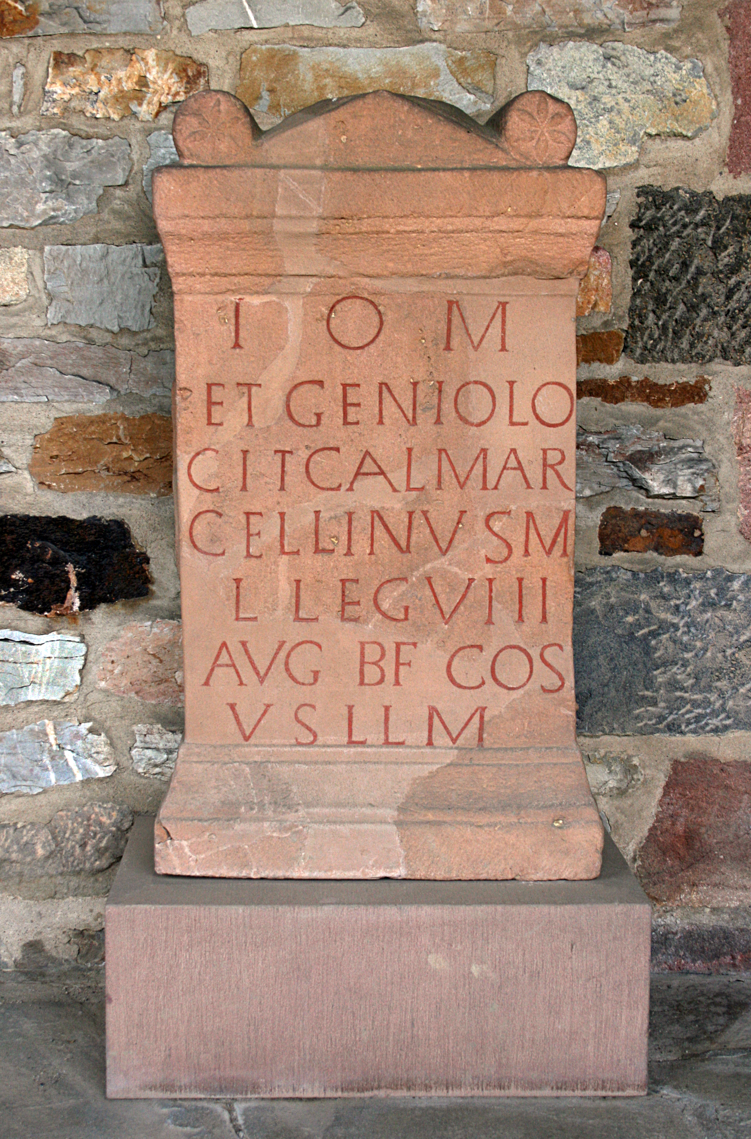 Weihestein eines beneficiarius consularis aus Stockstadt, ausgestellt im Salburgmuseum Bad Homburg. (CIL XIII, 06655) Epigraphische Datenbank Heidelberg HD060297